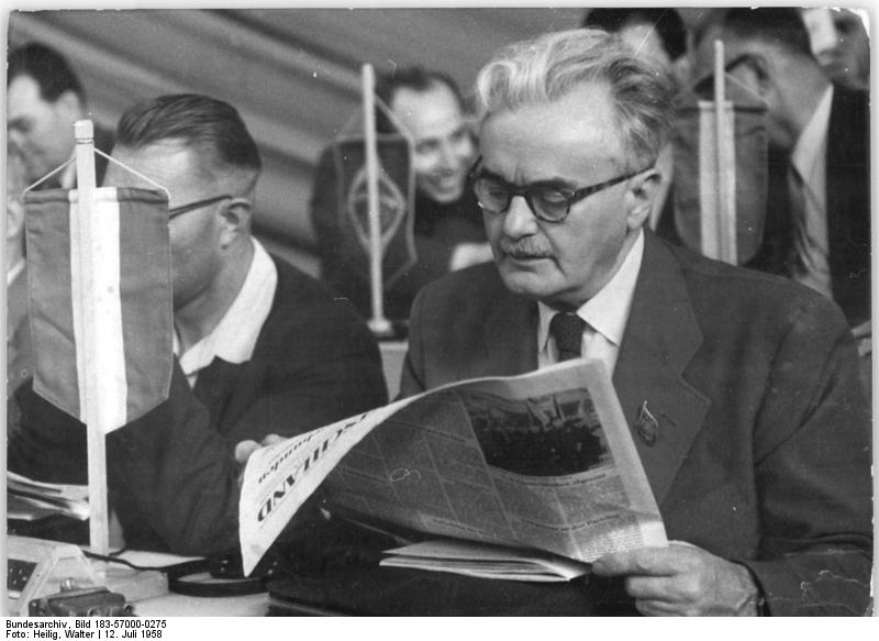 Zentralbild Heilig 12.7.1958. V. Parteitag der SED vom 10. bis 16.7.1958 in der Werner-Seelenbinder-Halle, Berlin, 3. Tag: UBz: Das Mitglied des Politbüros des Zentralkomitees der Kommunisten Partei Österreichs, Franz Honner.